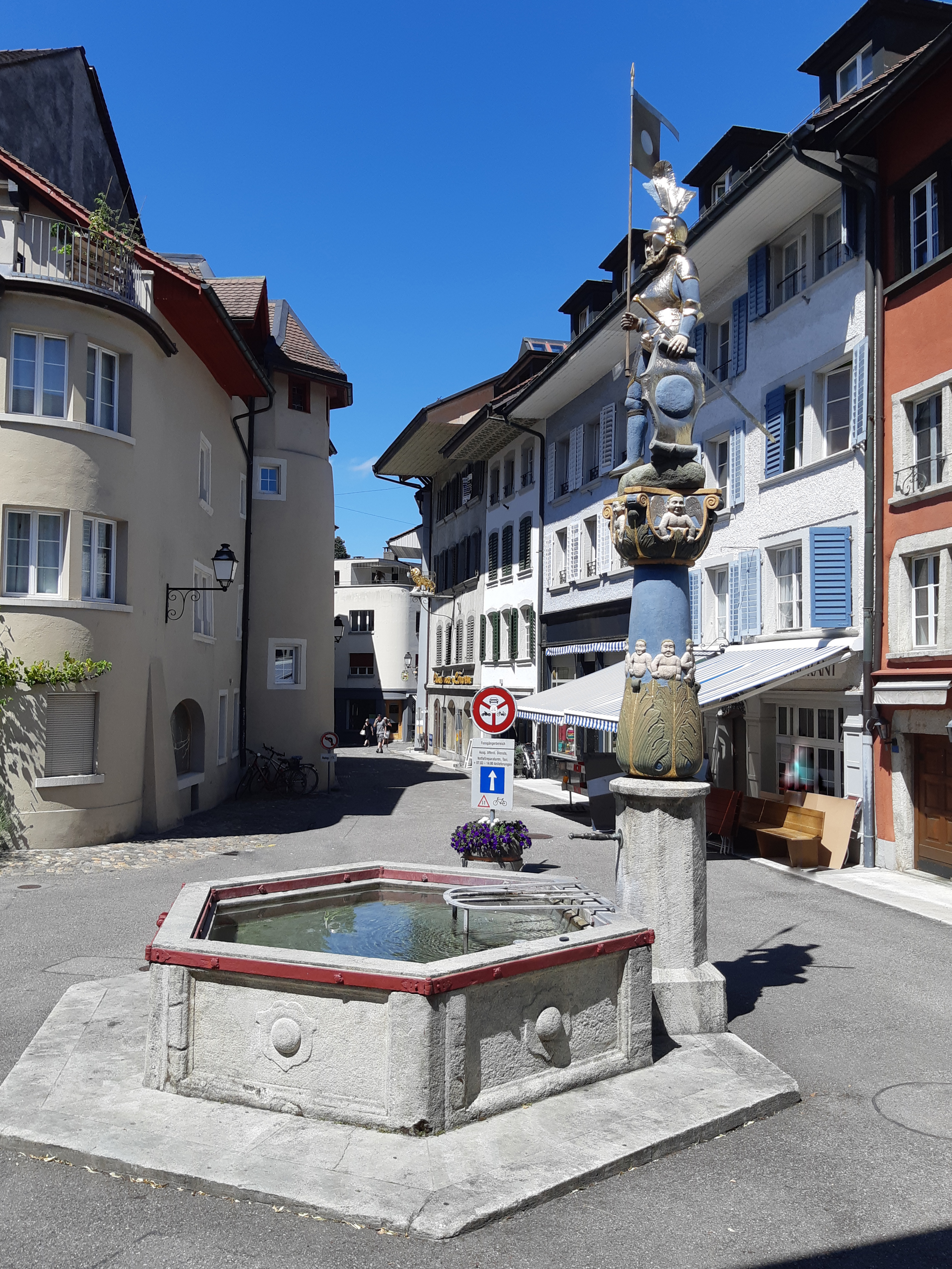 Klausbrunnen in Lenzburg, (Switzerland)